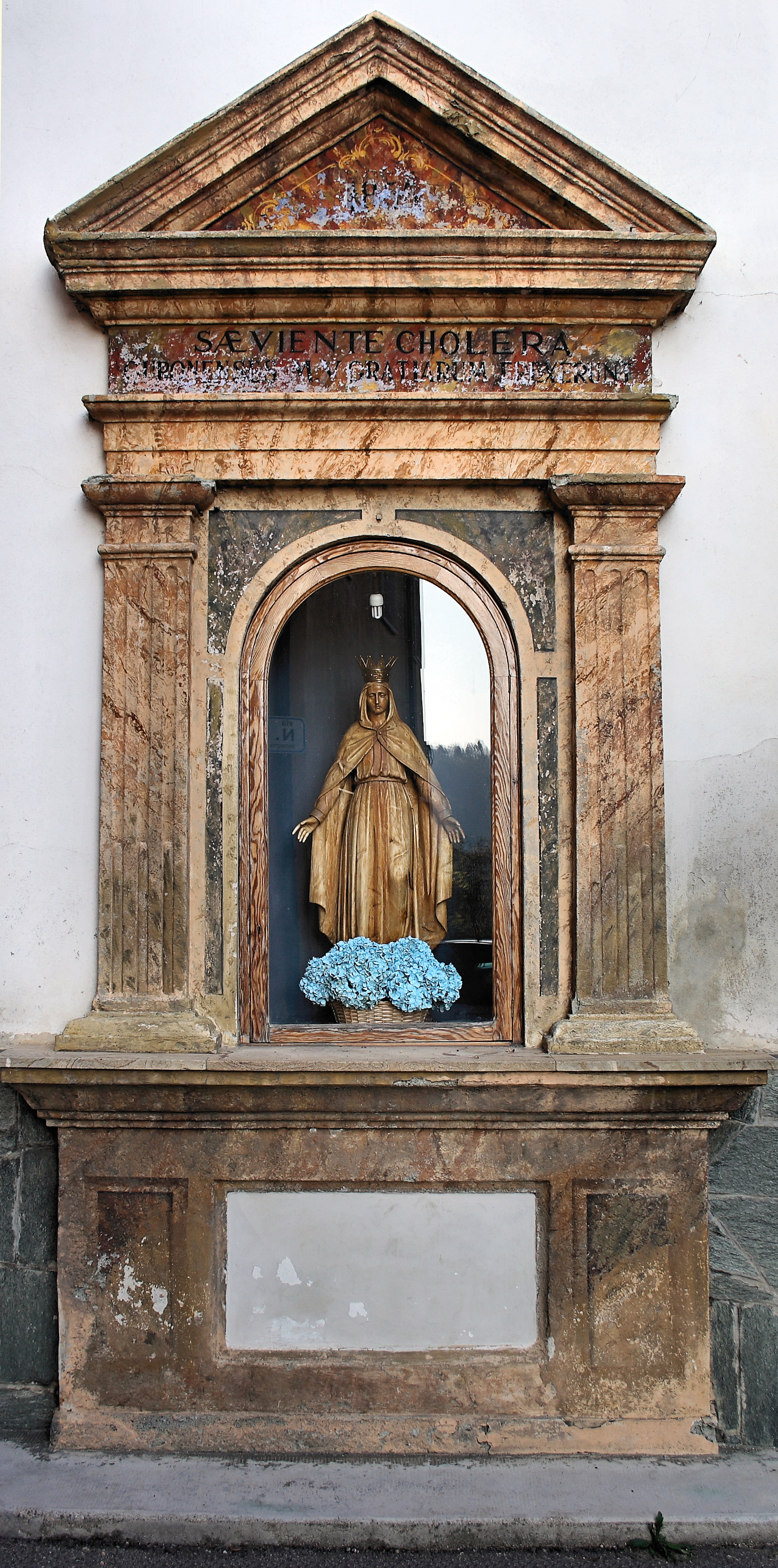 Foto di un tabernacolo di una Madonnina del paese di Gurone